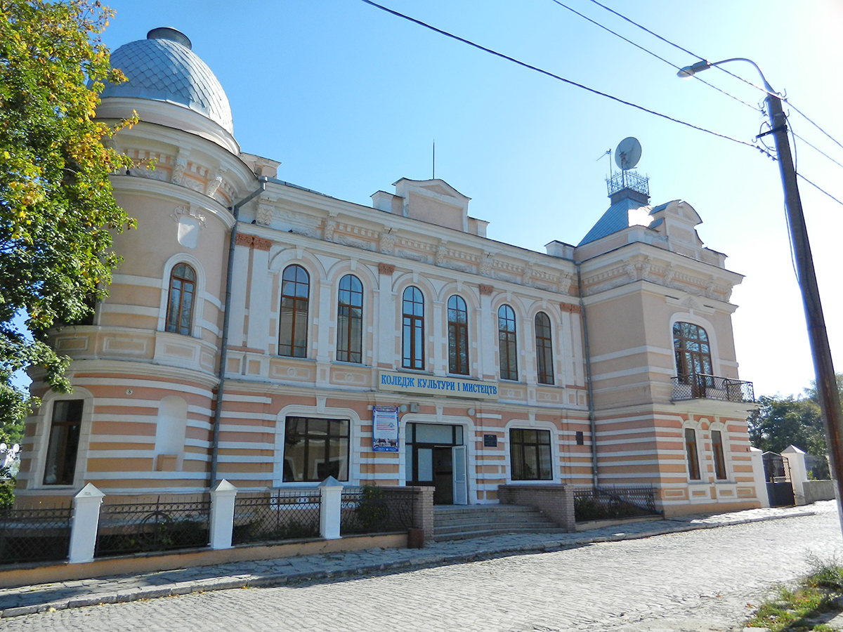 Хмельницька область, м.Кам'янець-Подільський